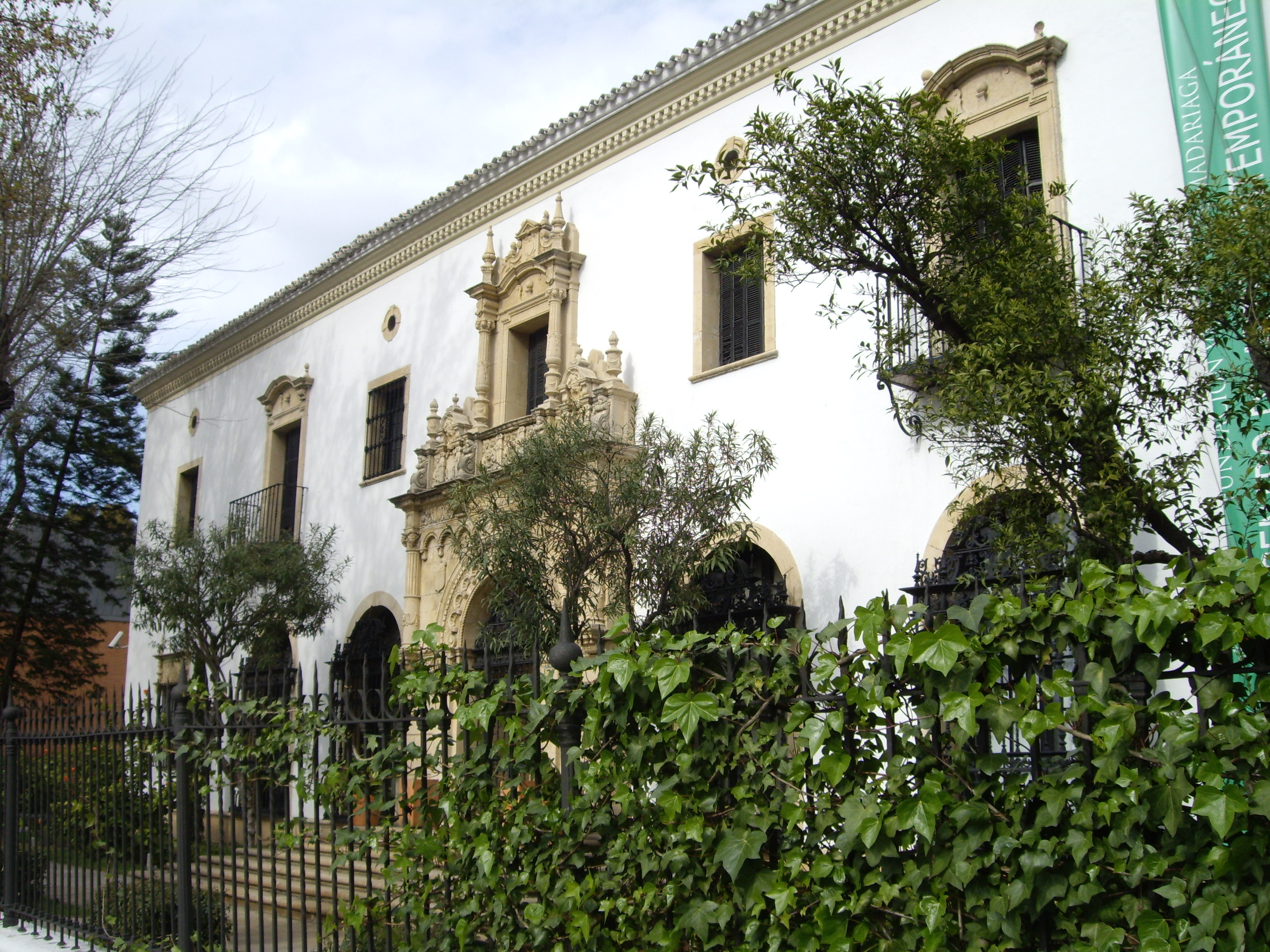 Parte del pabellón que da al Paseo de las Delicias de Sevilla. Edificio de la Exposición Iberoamericana de 1929